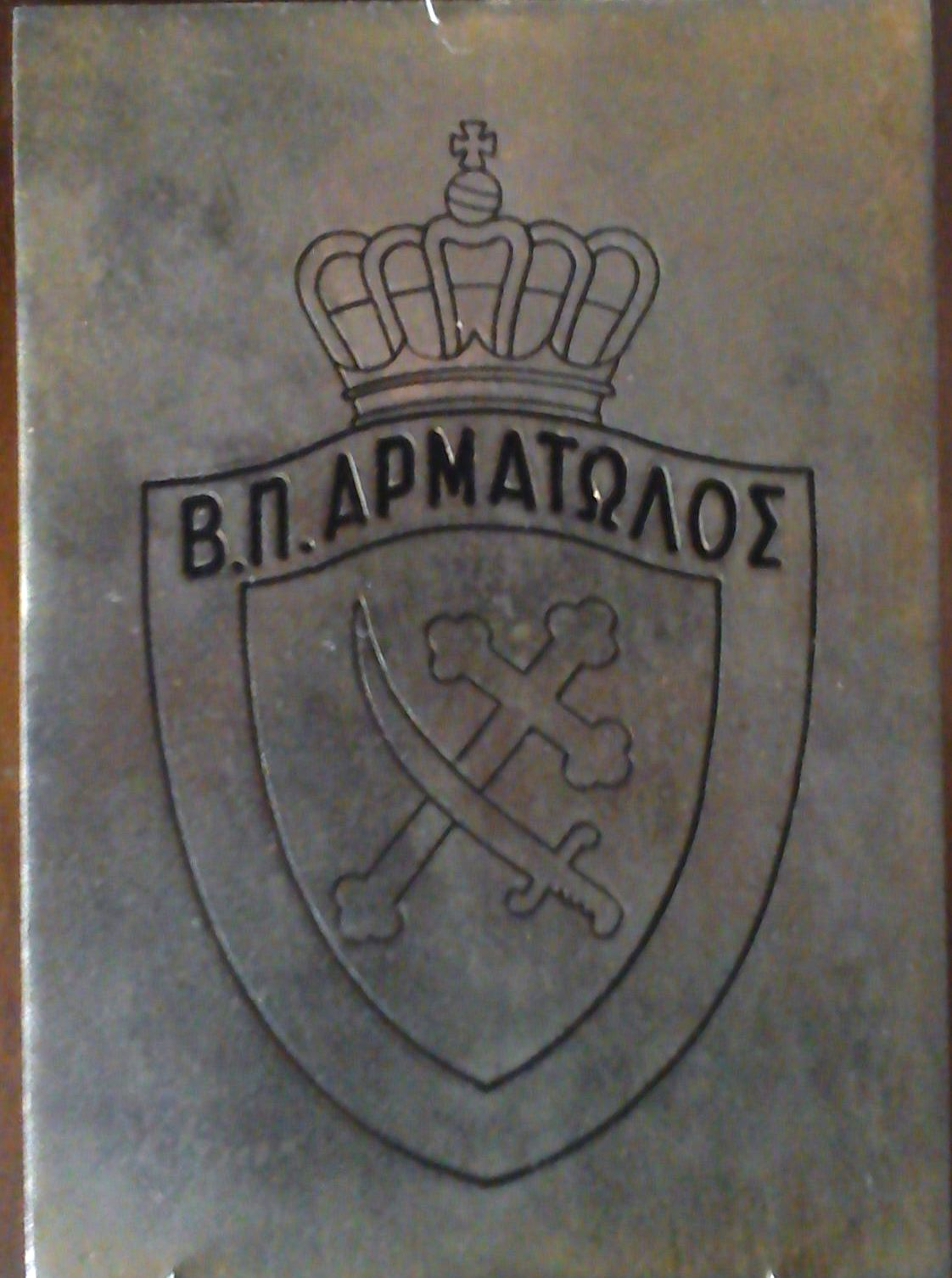 Το έμβλημα του πλοίου "Αρματωλός" του Βασ. Πολεμικού Ναυτικού της Ελλάδος.